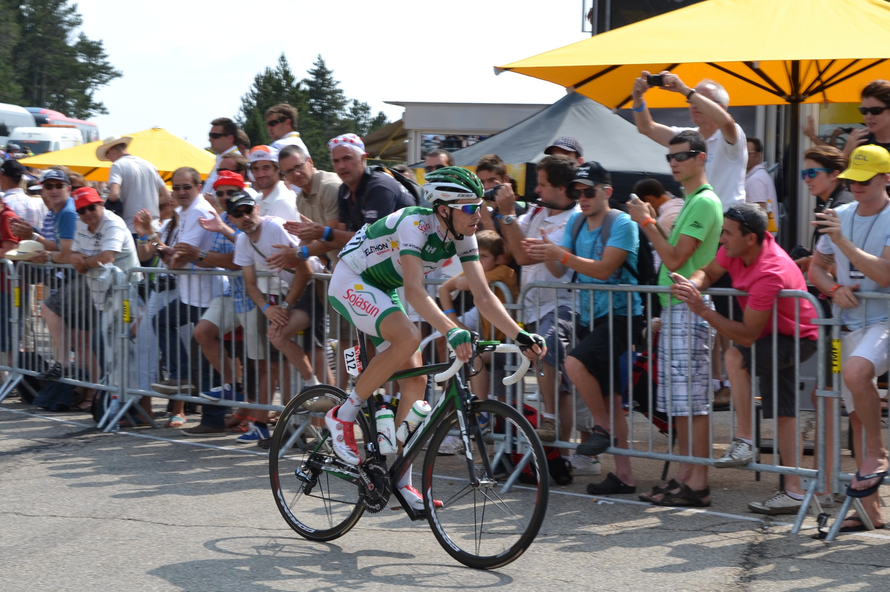 Au Chalet Reynard, lors de la 15ème étape du Tour de France 2013